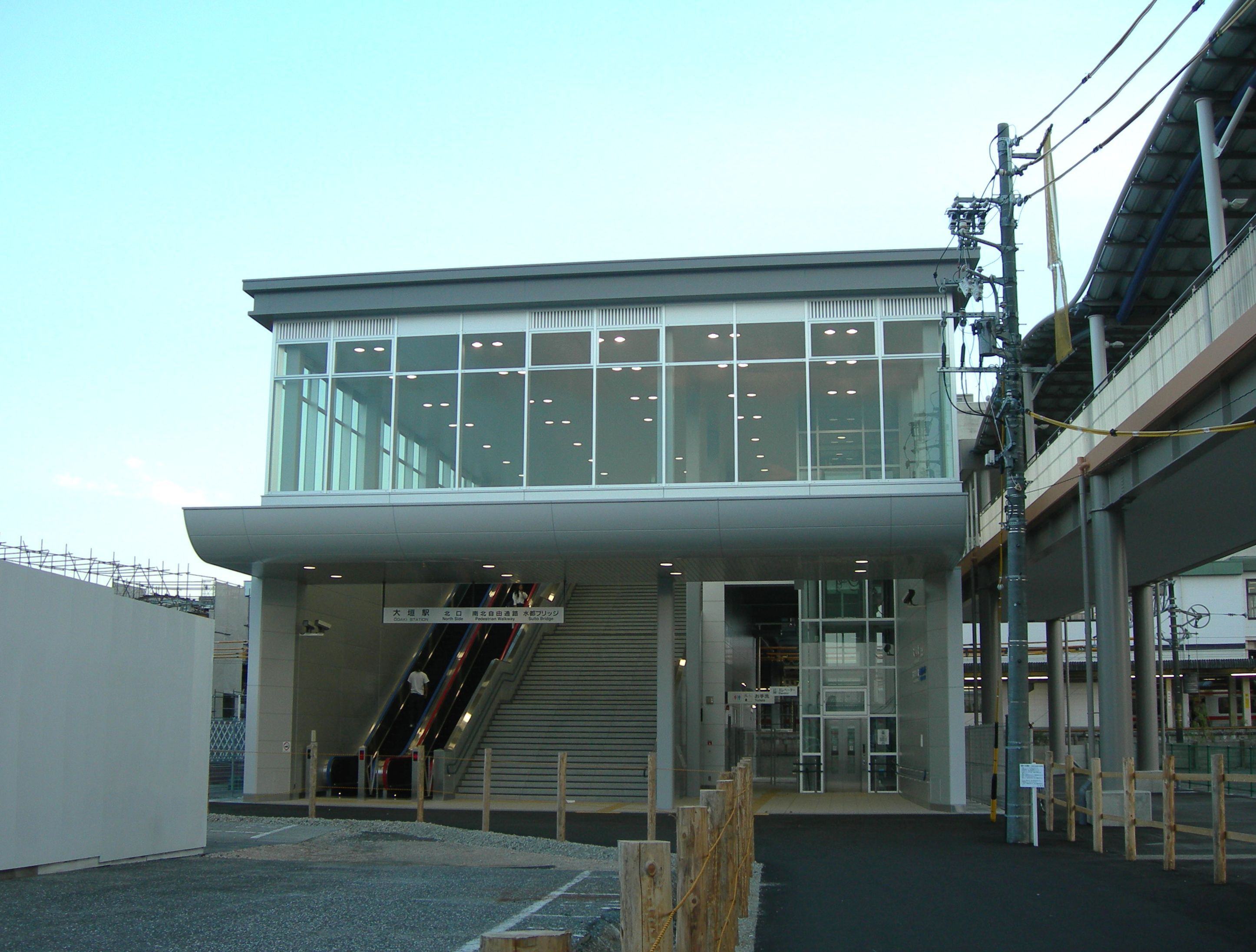 大垣駅北口